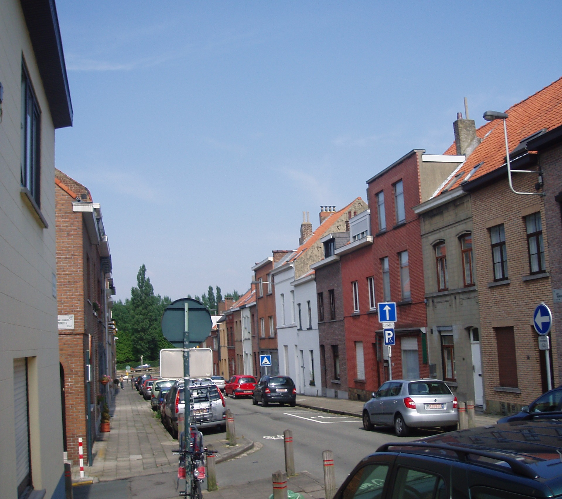 rue Albert Meunier Auderghem Belgium